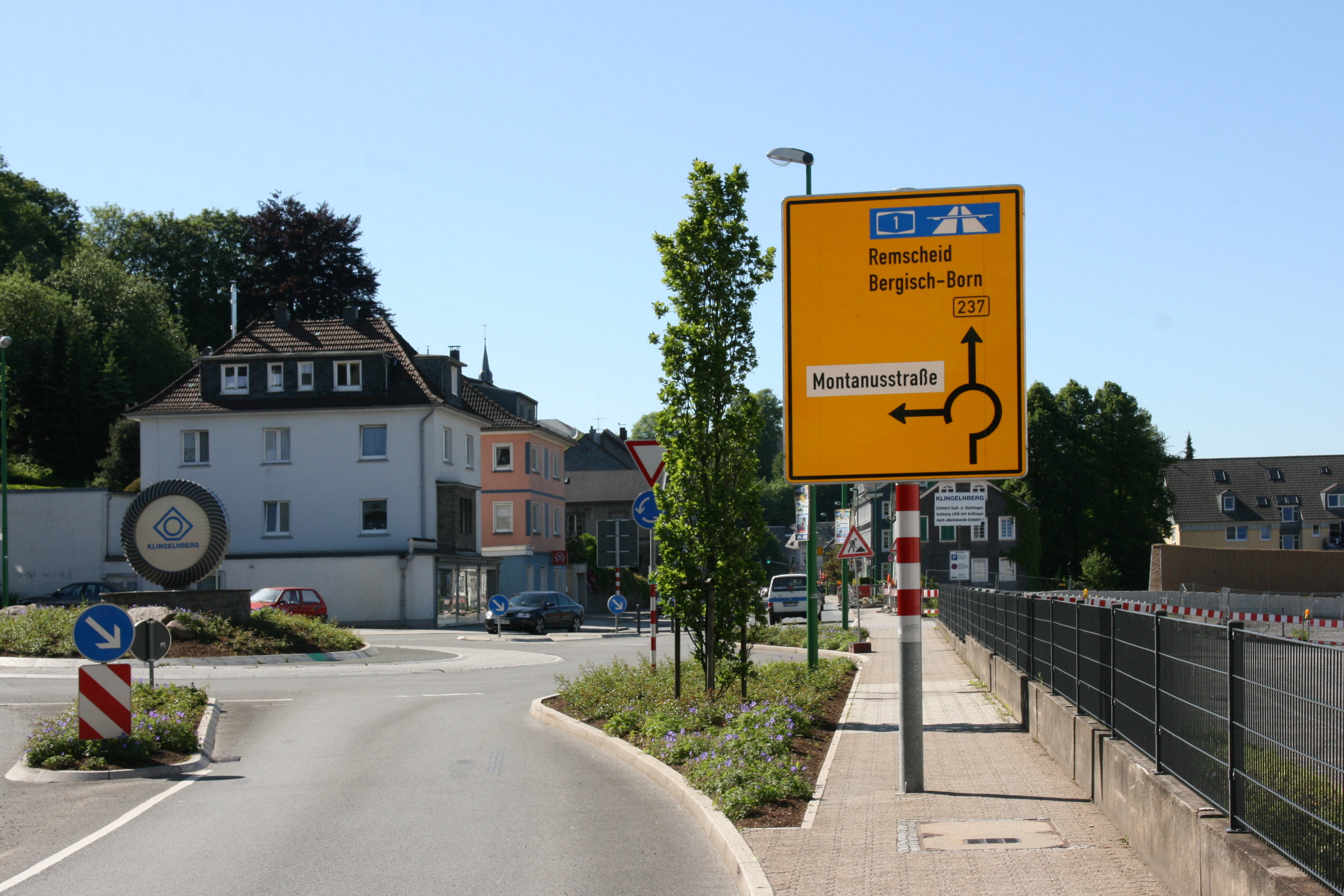 Montanuskreisel, Peterstraße/Montanusstraße in Hückeswagen